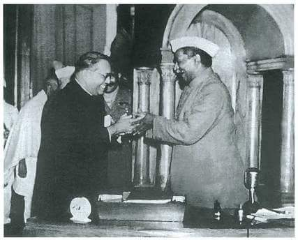 डॉ. बाबासाहेब आंबेडकर भारतीय संविधान डॉ. राजेंद्र प्रसादांकडे सुपूर्द करतांना.